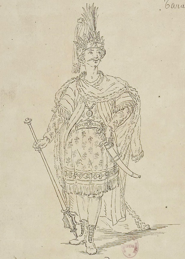 Unbekannter Künstler: Kostümentwurf für den besiegten König Atar in der Oper "Tarare" von Antonio Salieri (1750–1825) und Pierre-Augustin Caron de Beaumarchais (1732–1799), Paris 1787. Bibliothèque nationale de France.